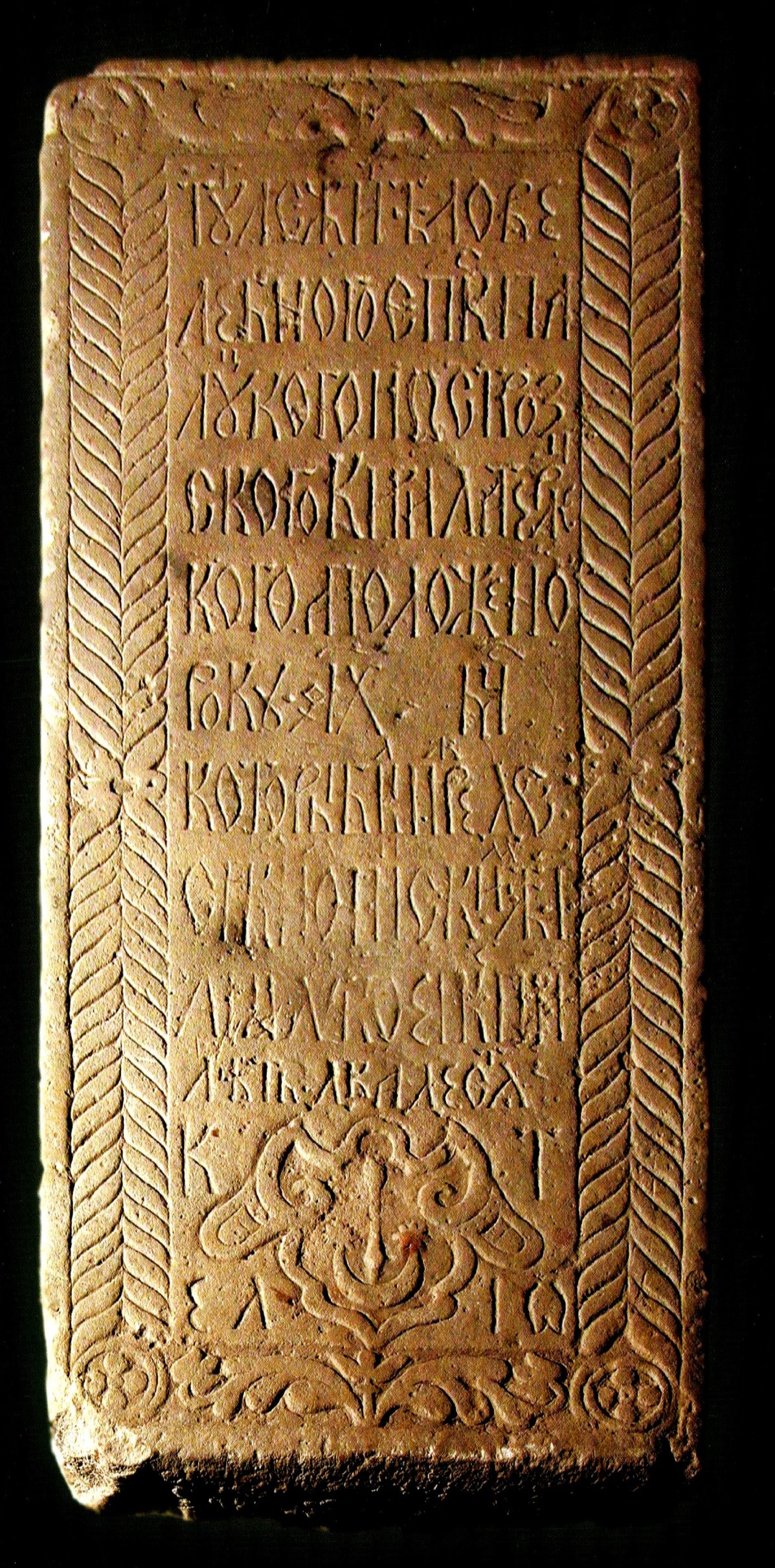 Надмагілле Кірылы Цярлецкага